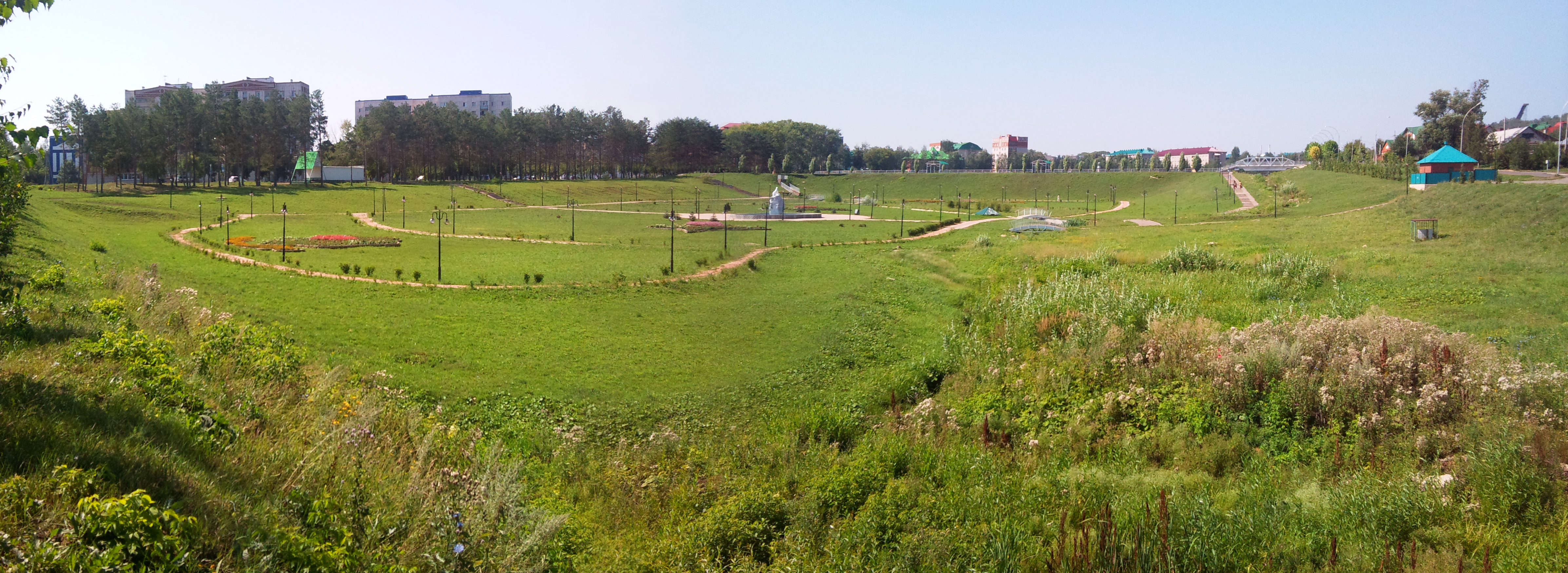 Парк Мэхэббэт в городе Лениногорск